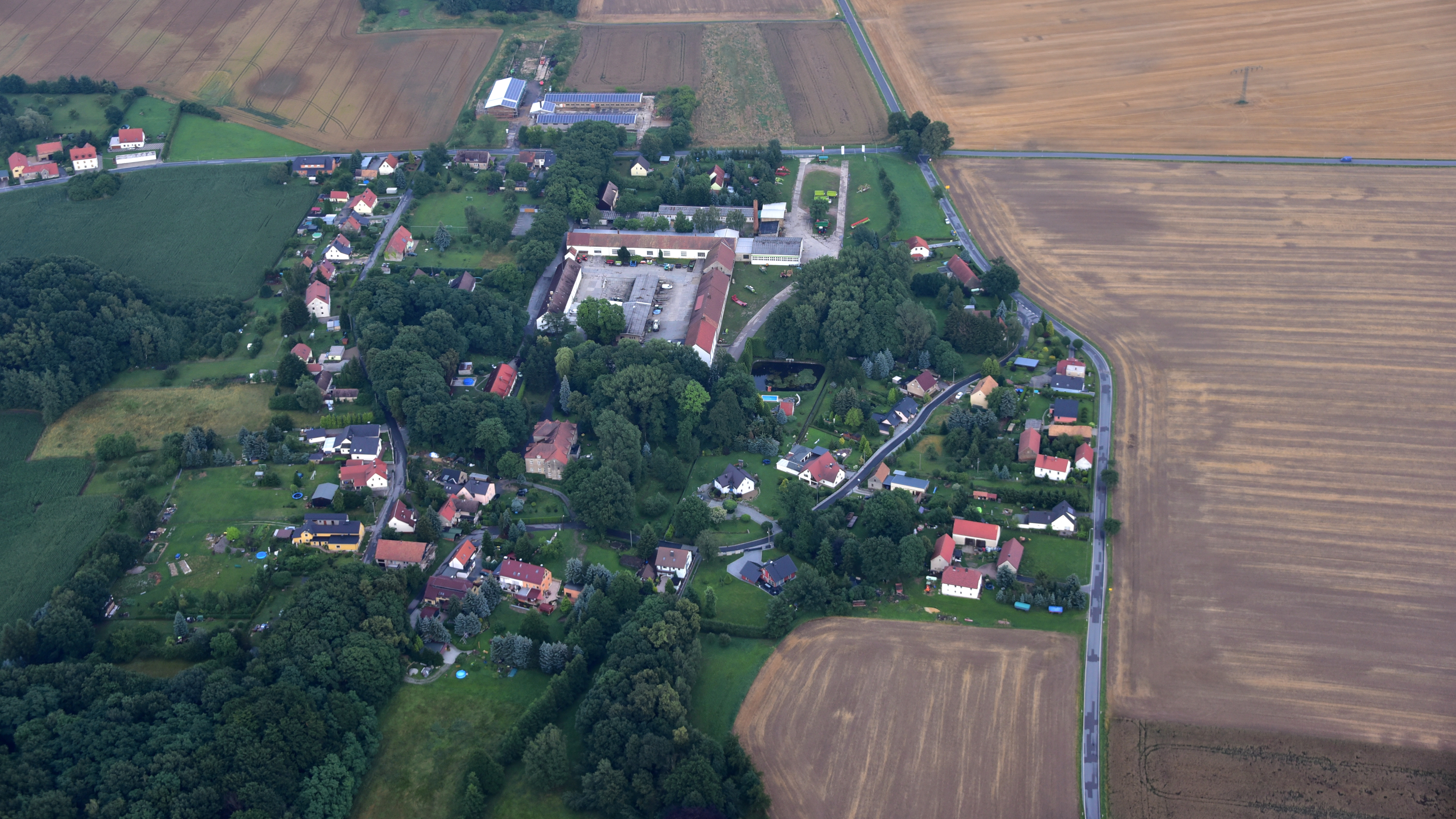 Luttowitz, Luftaufnahme (2017) Hornjoserbsce: Powětrowy wobraz Lutobča (2017)